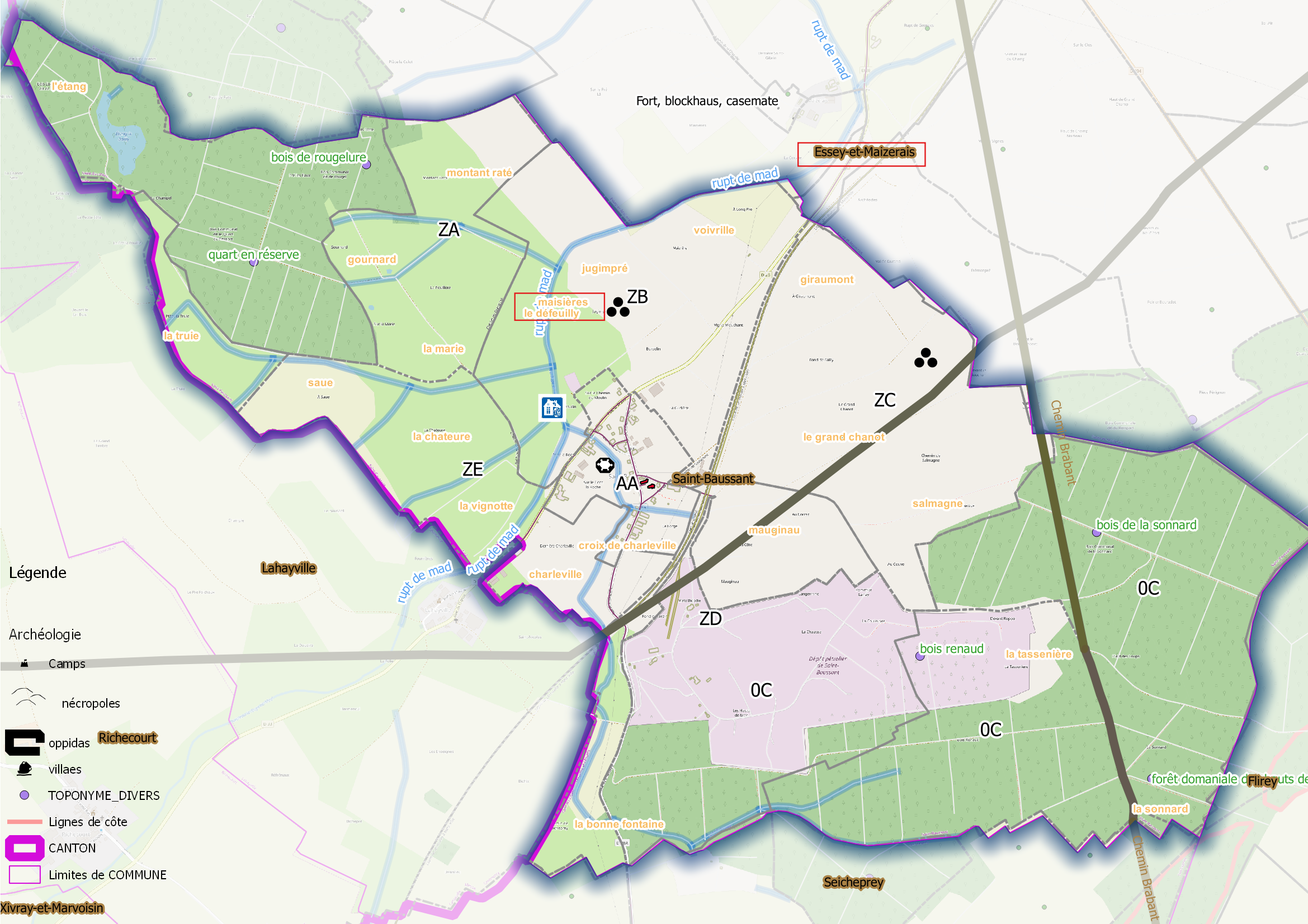 Saint-Baussant (ban communal) OSM et Qgis, mentions additionnelles